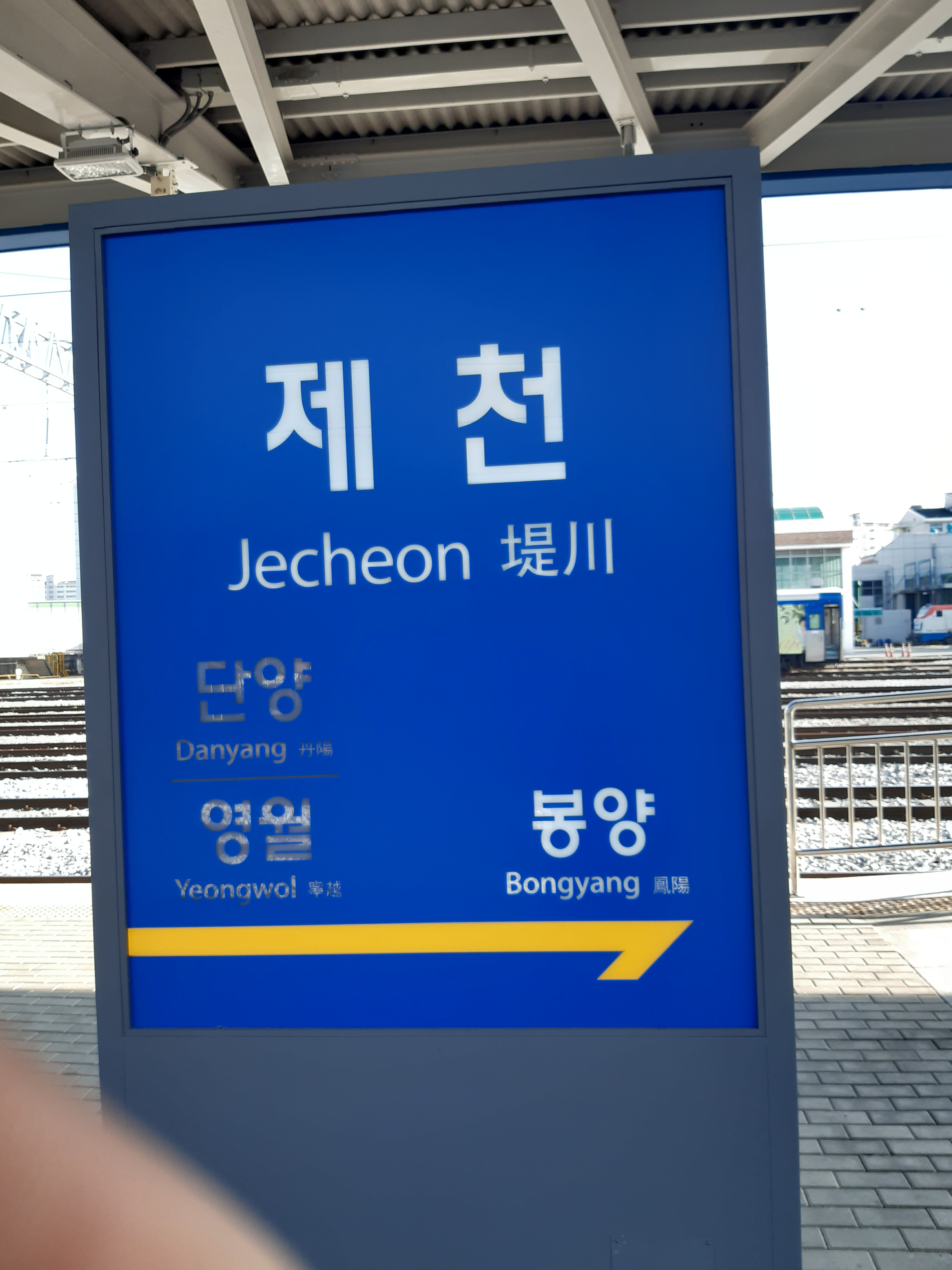 제천역 역명판 (청량리 방면)